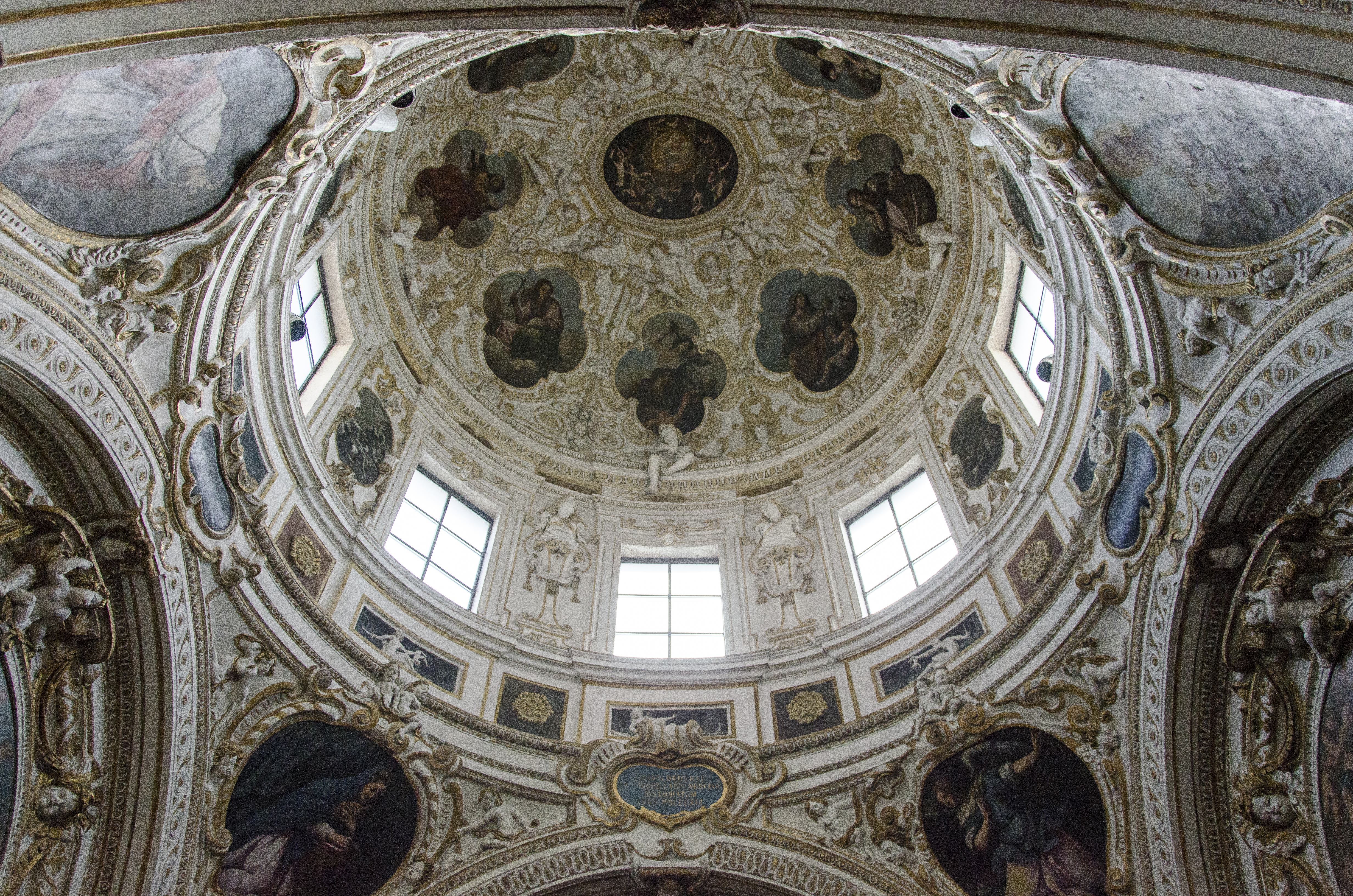 Fotografia dell'interno